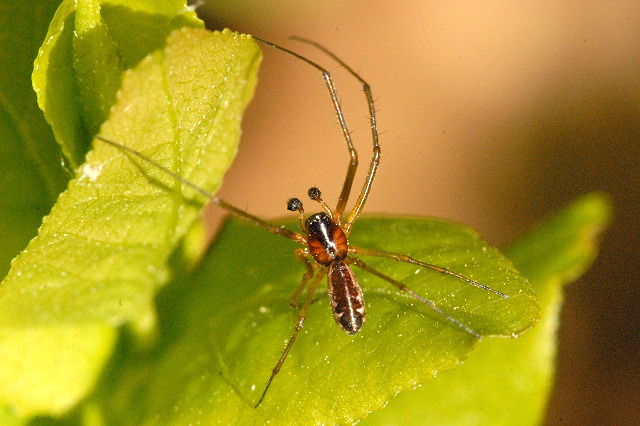 Neriene peltata from Commanster, Belgian High Ardennes .